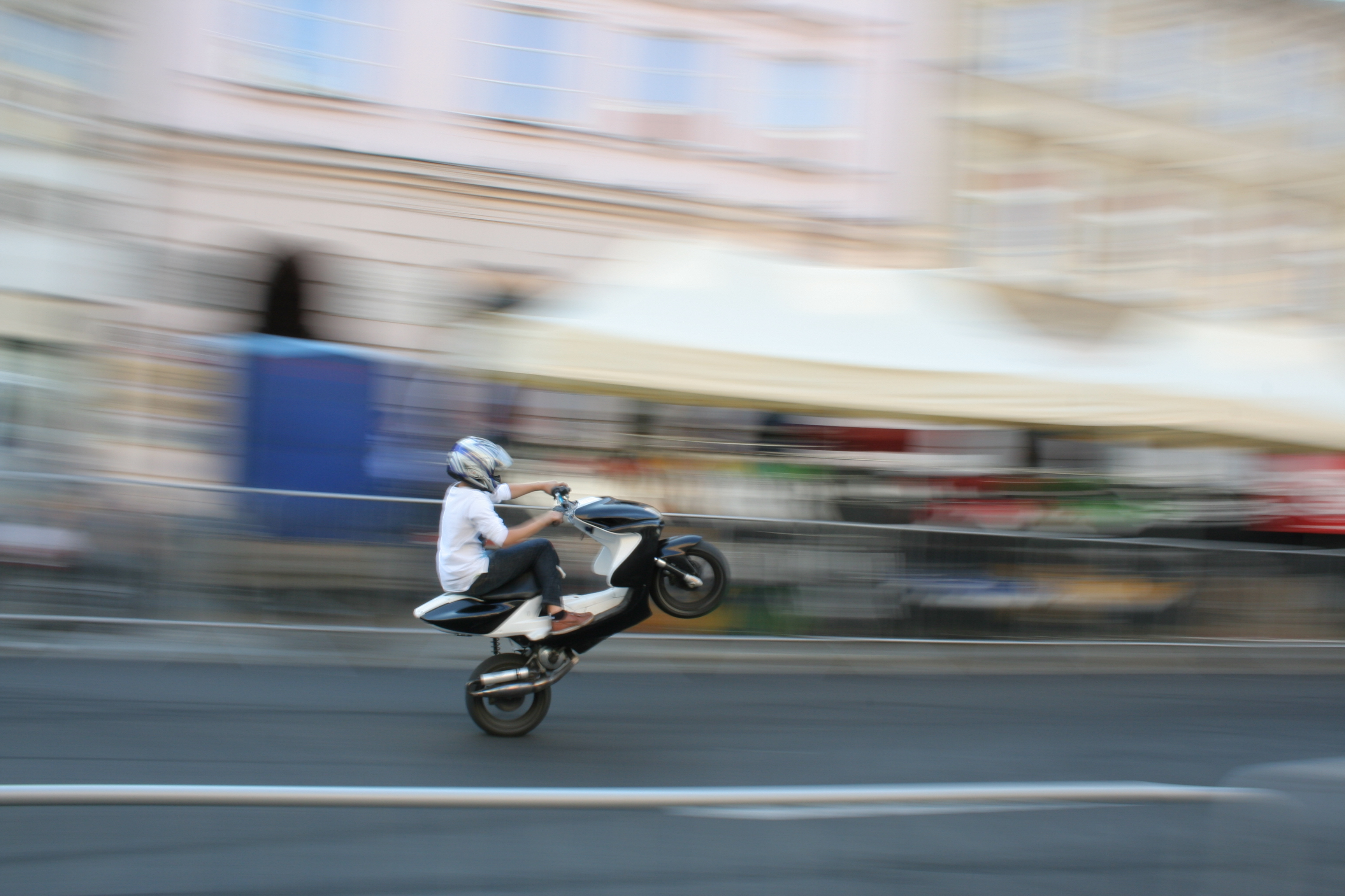 Panoramed motorcycle in Warsaw, Nowy Świat street